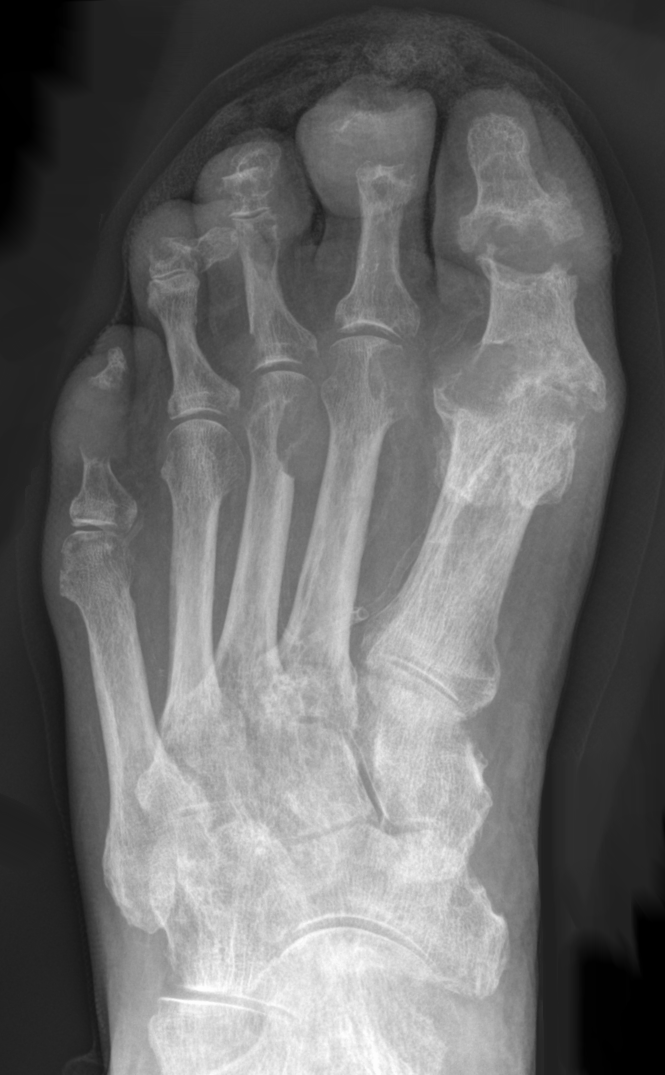 Gicht im Röntgenbild des Fußes mit multiplen Destruktionen.